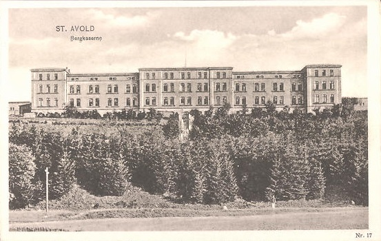 Bergkaserne in St. Avold, vor 1914 gelaufene Postkarte